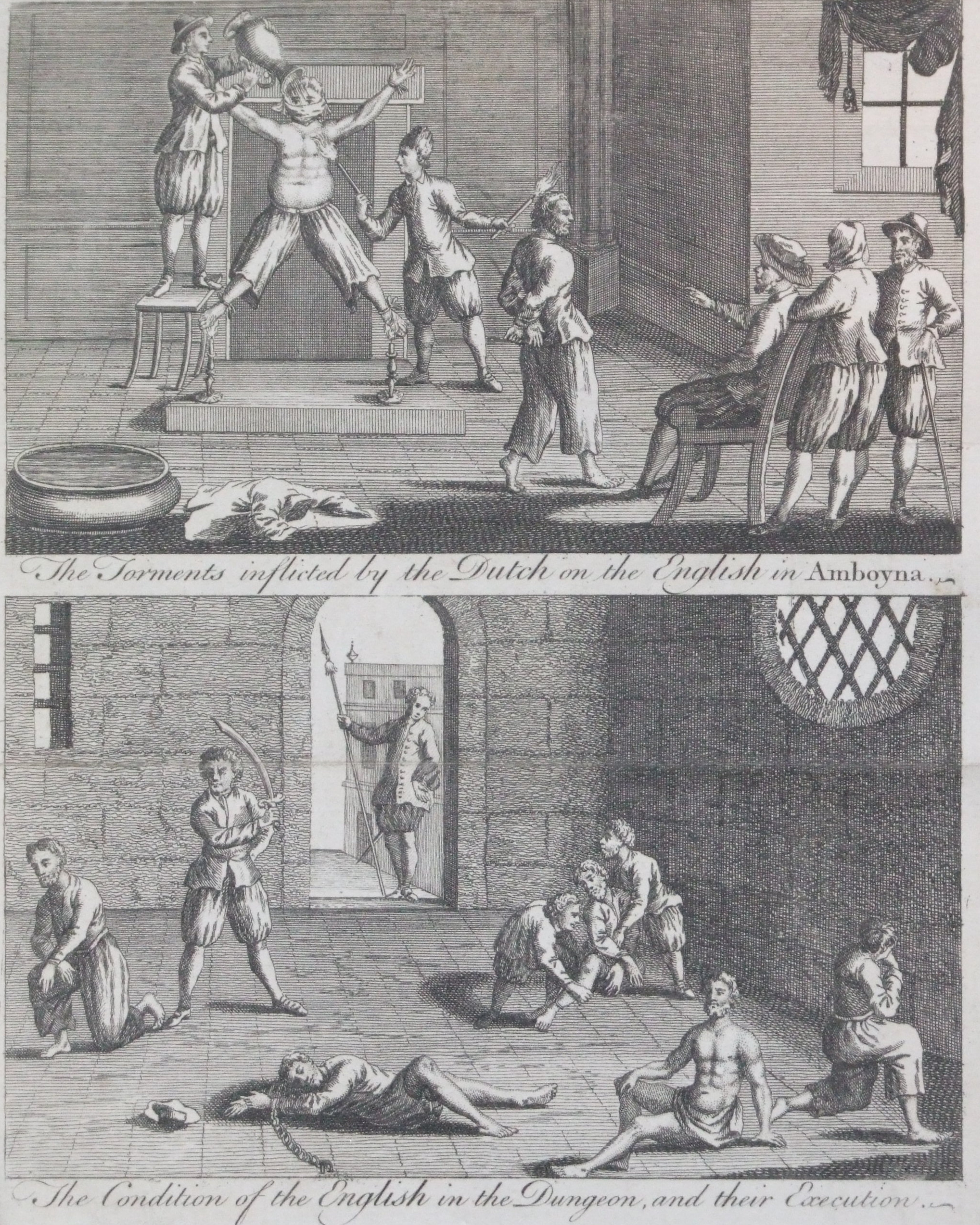 copper engraving